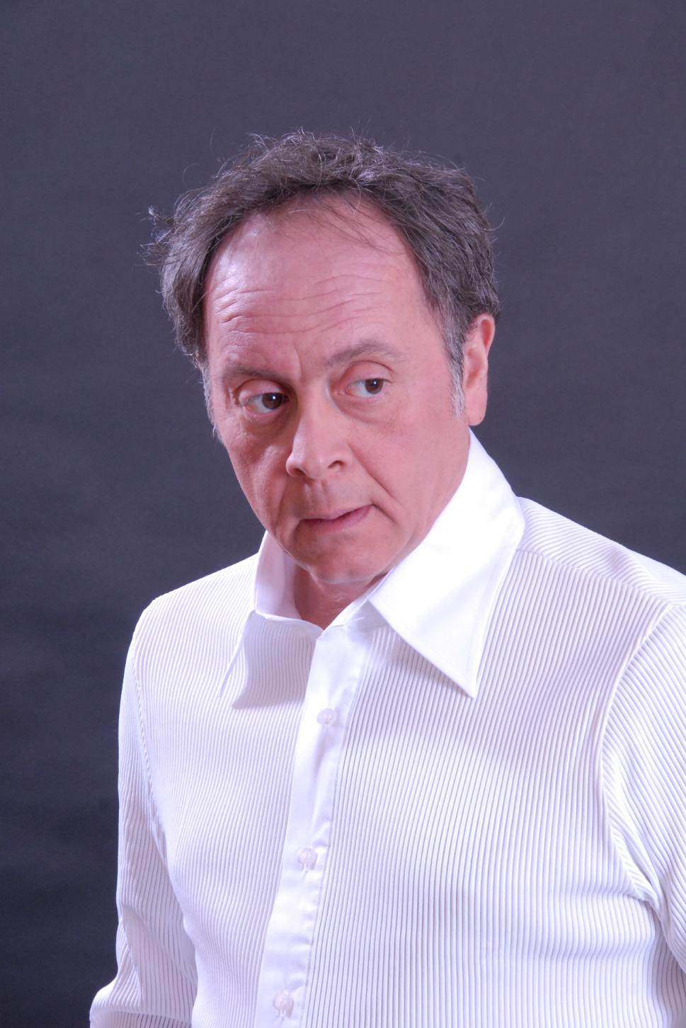 Ritratto dell'attore e regista Nicola Valenzano